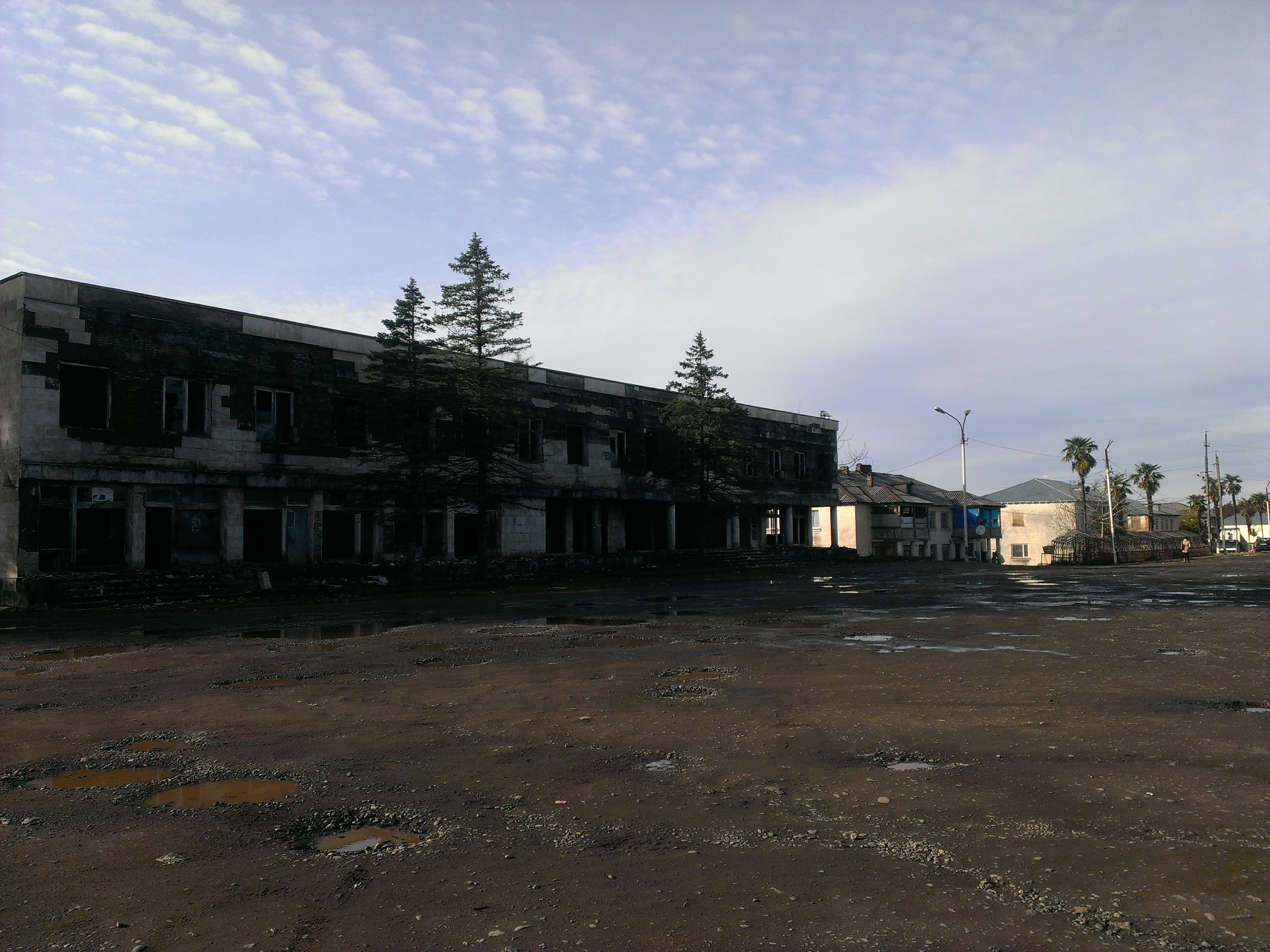 center